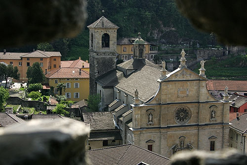 Blick vom Castelgrande zur SS. Pietro e Stefano (Bellinzona)